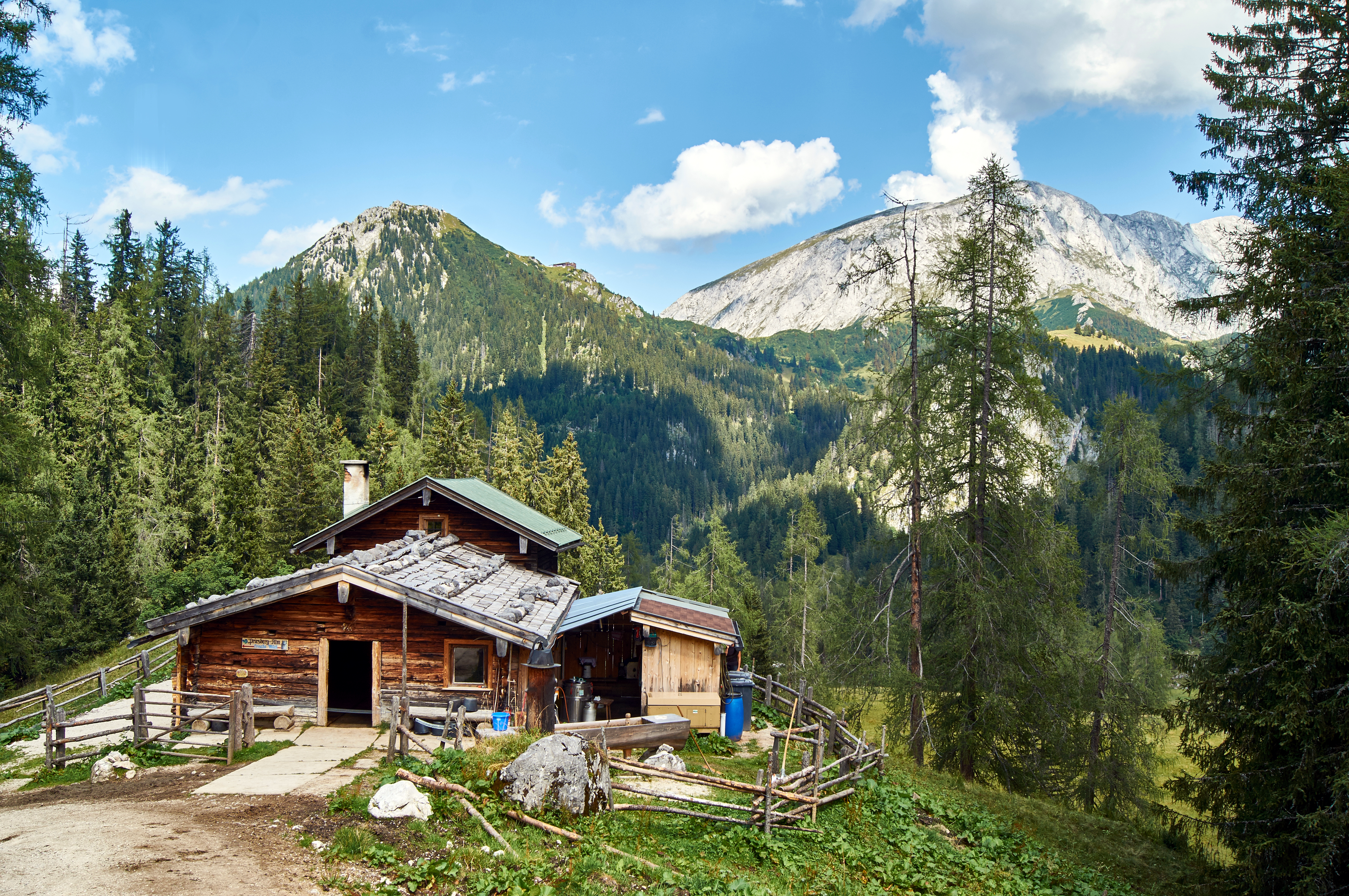 Die Priesberg-Alm mit Jenner und Brett im Nationalpark Berchtesgaden. This is an image of the Biosphere Reserve: Berchtesgaden Alps Biosphere Reserve